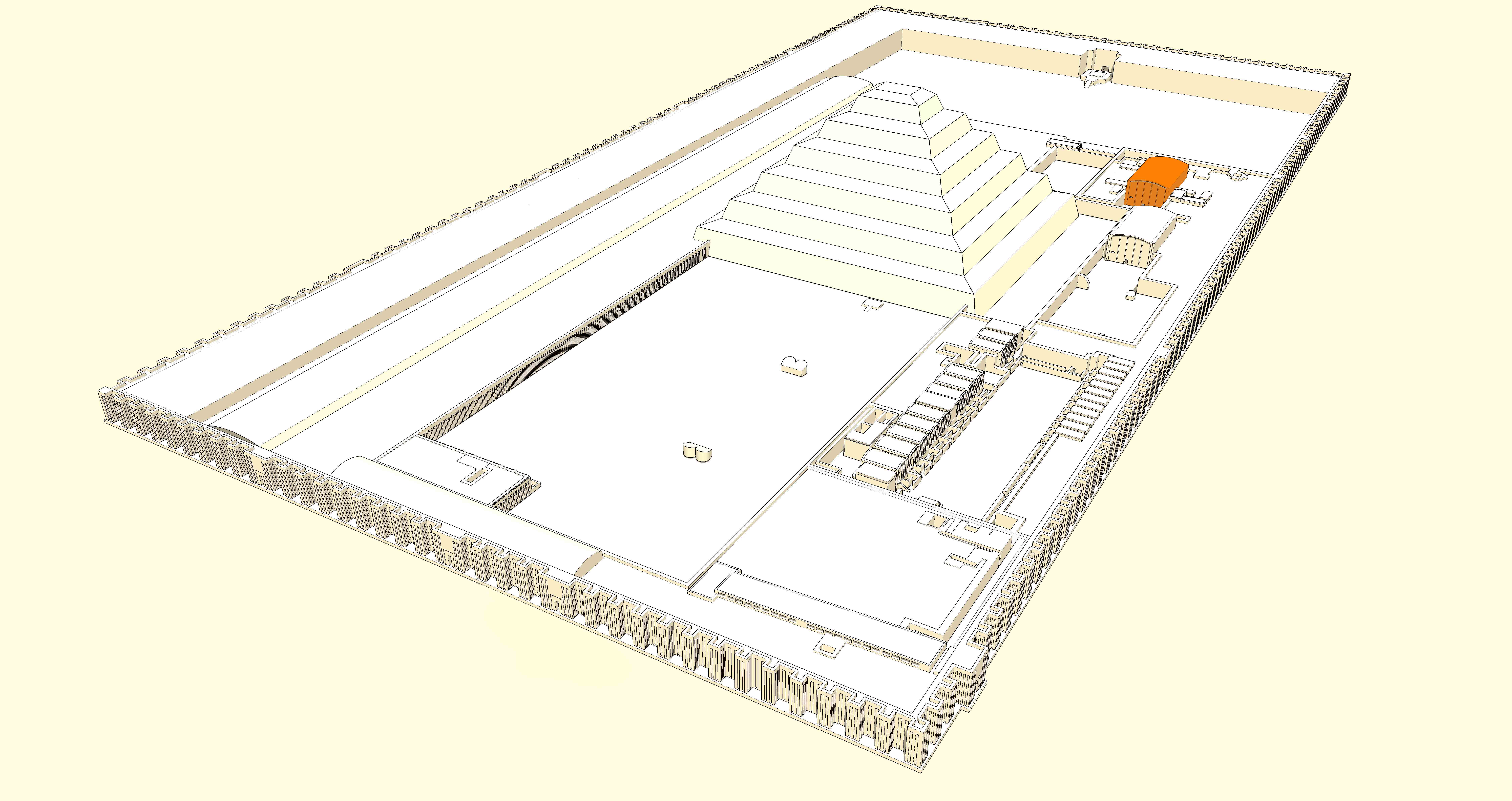 Position du pavillon nord dans le complexe funéraire de Djoser